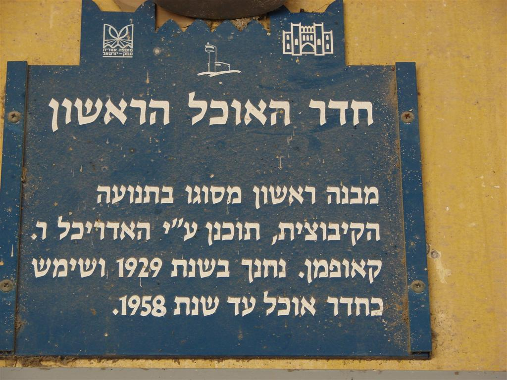 חדר האוכל בגניגר - השלא של המועצה לשימור אתרים